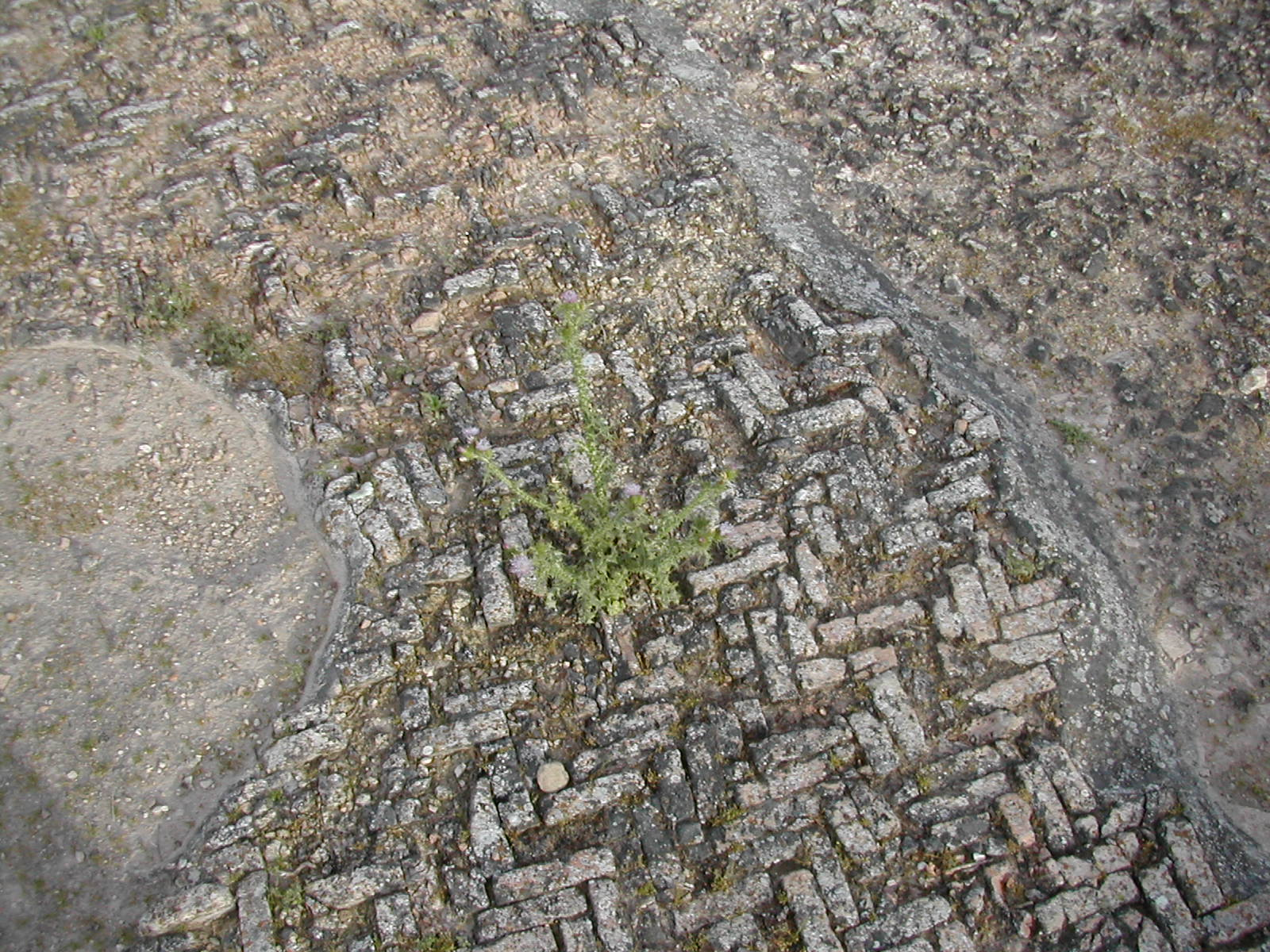 Opus spicatum en el foro de la ciudad ibero-romana de Cástulo en Jaén.